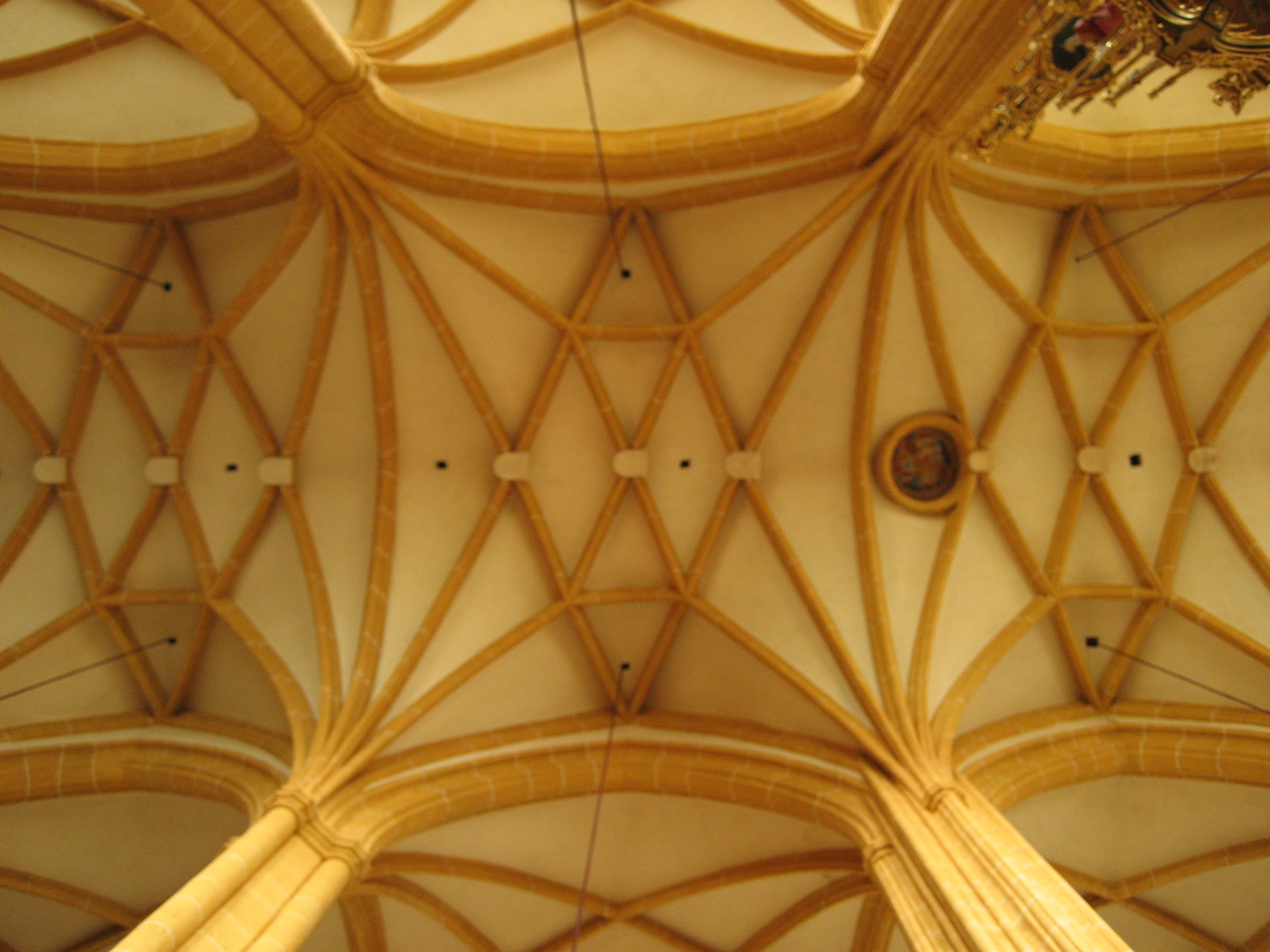 Wallfahrtskirche Maria Trost in Fernitz, Steiermark, Österreich / Church Maria Trost in Fernitz, Styria, Austria